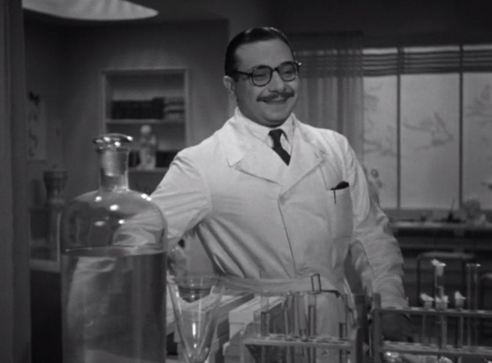 Screenshot dal film Imputato, alzatevi! (1939)